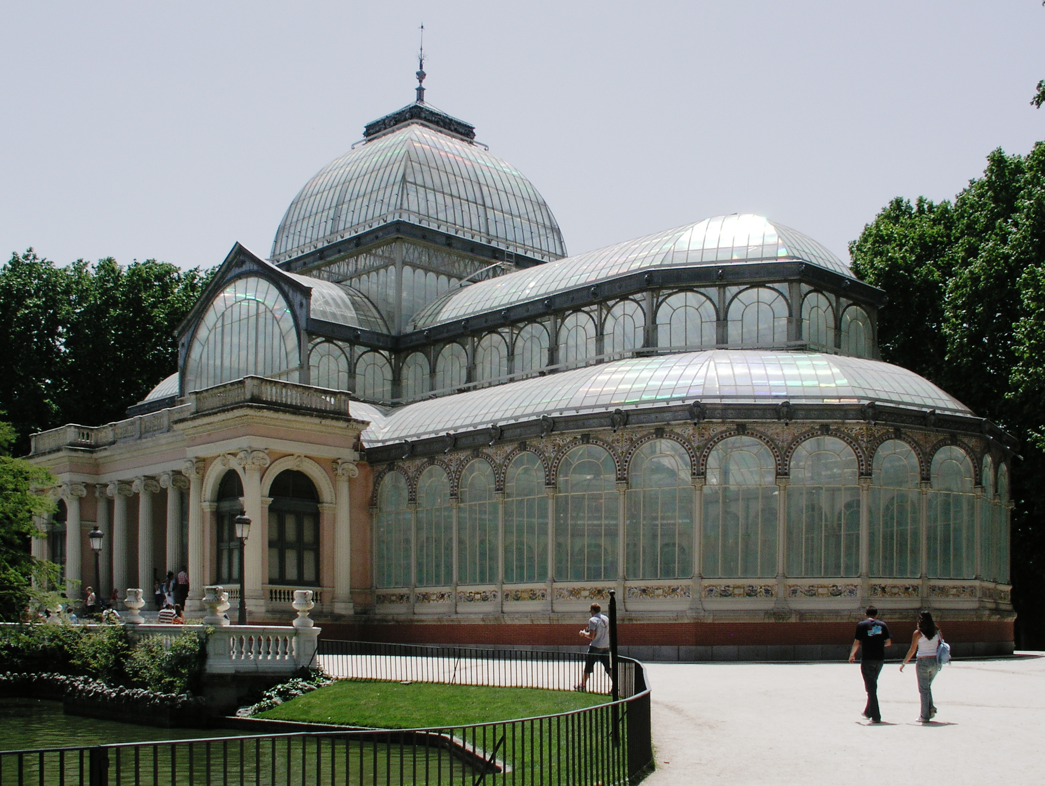 Palacio de Cristal, Parque del Buen Retiro, Madrid, Spain